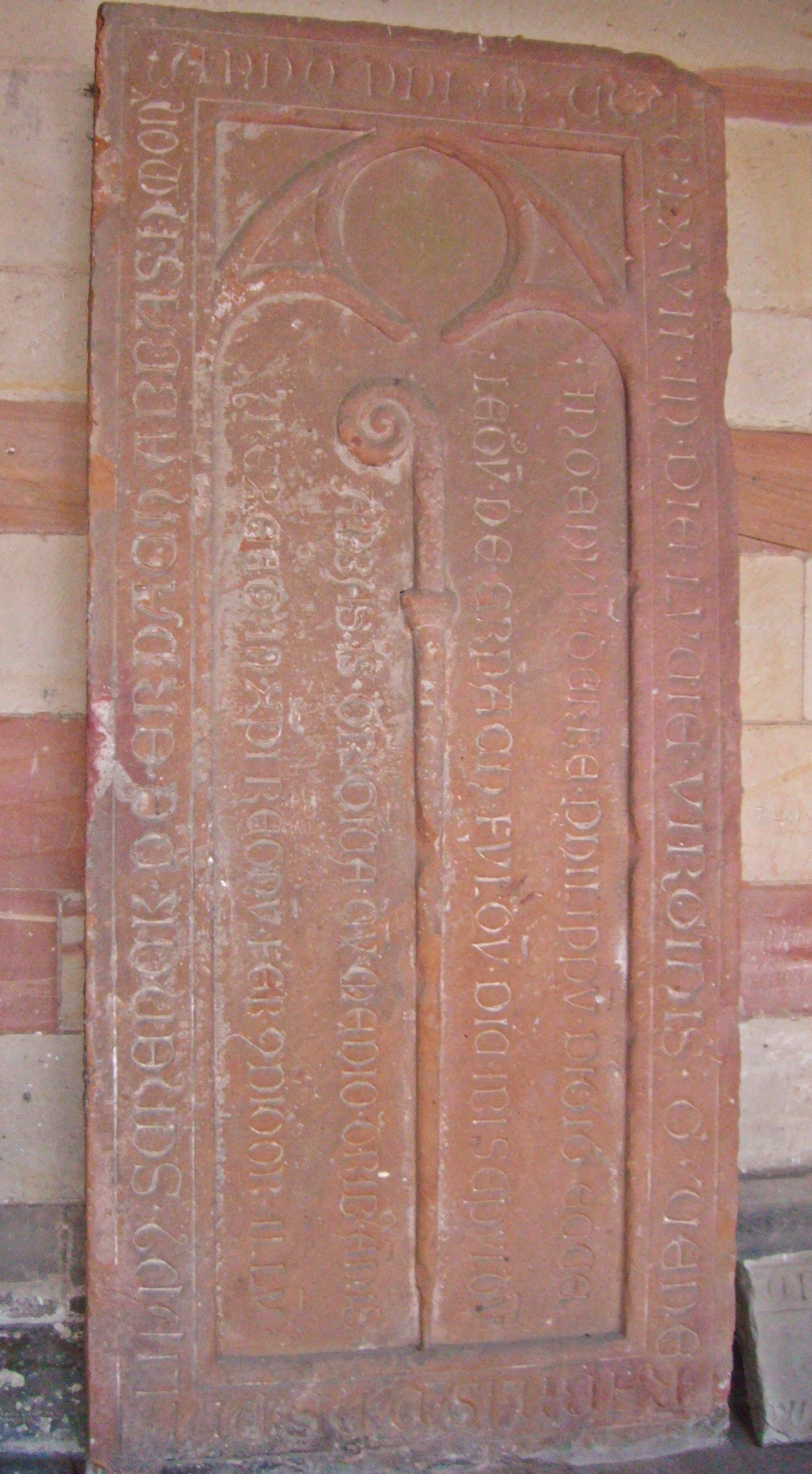 Grabplatte des Weissenburger Abtes Philipp Schenk von Erbach (+ 1467), Bruder des Mainzer Erzbischofs Dietrich Schenk von Erbach, Kreuzgang der Abteikirche St. Peter und Paul, Wissembourg (Elsass)